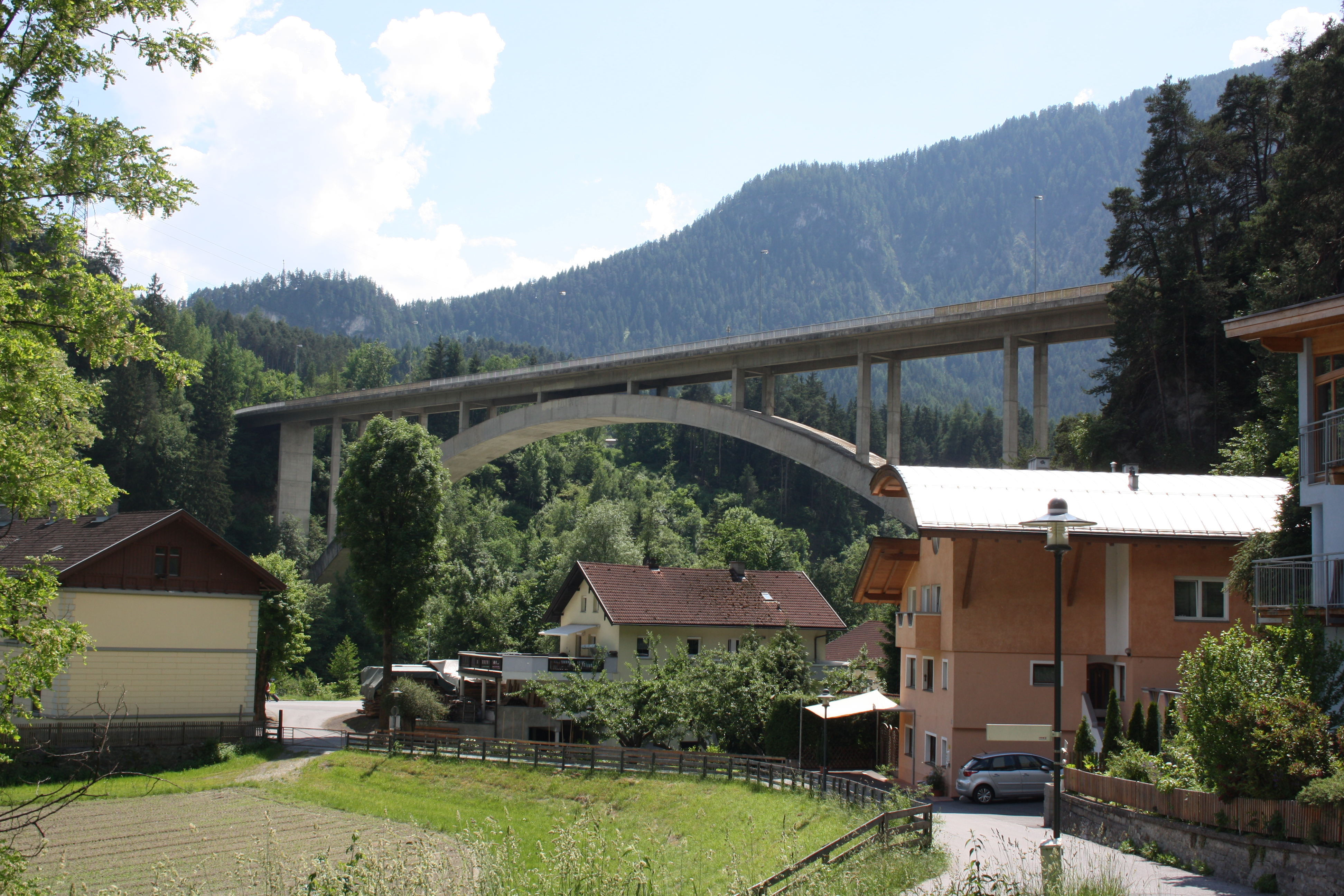 Innbrücke der Pitztalstraße (L16), Ansicht vom Ortsteil Königskapelle der Gemeinde Karrösten.